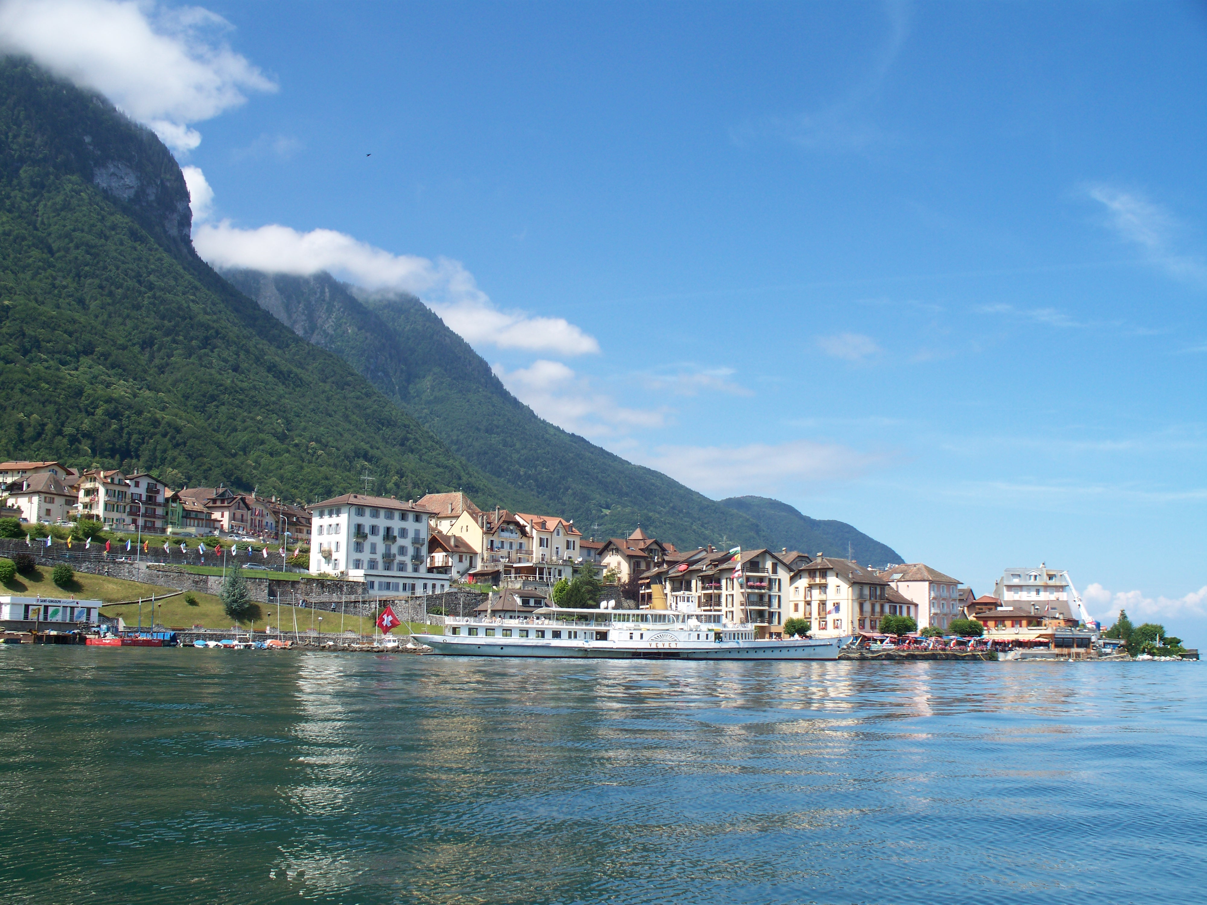 Vue sur le débarcadère de Saint-Gingolph (Valais)